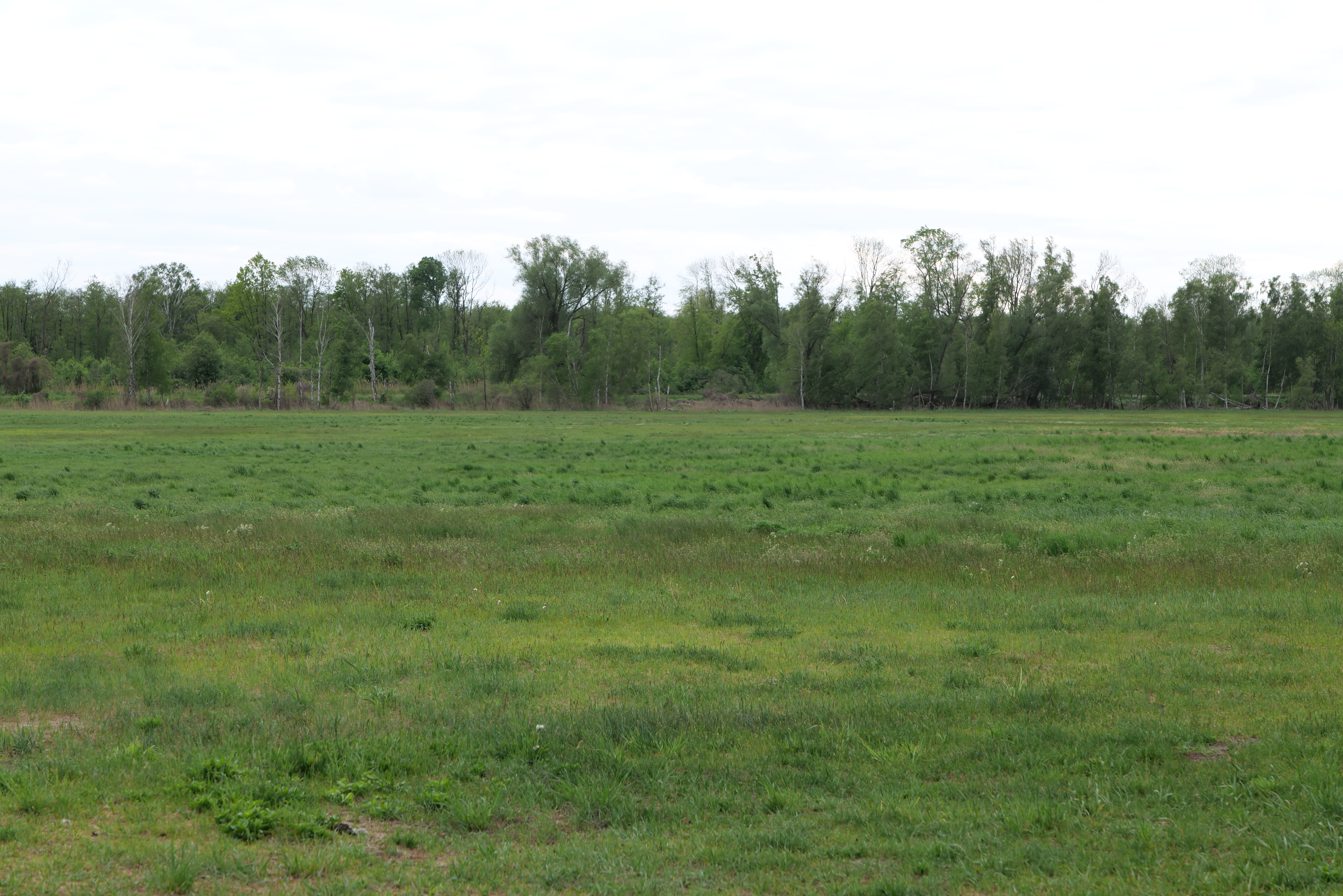 Oberes Rhinluch bei Hakenberg am 15. Mai 2020.